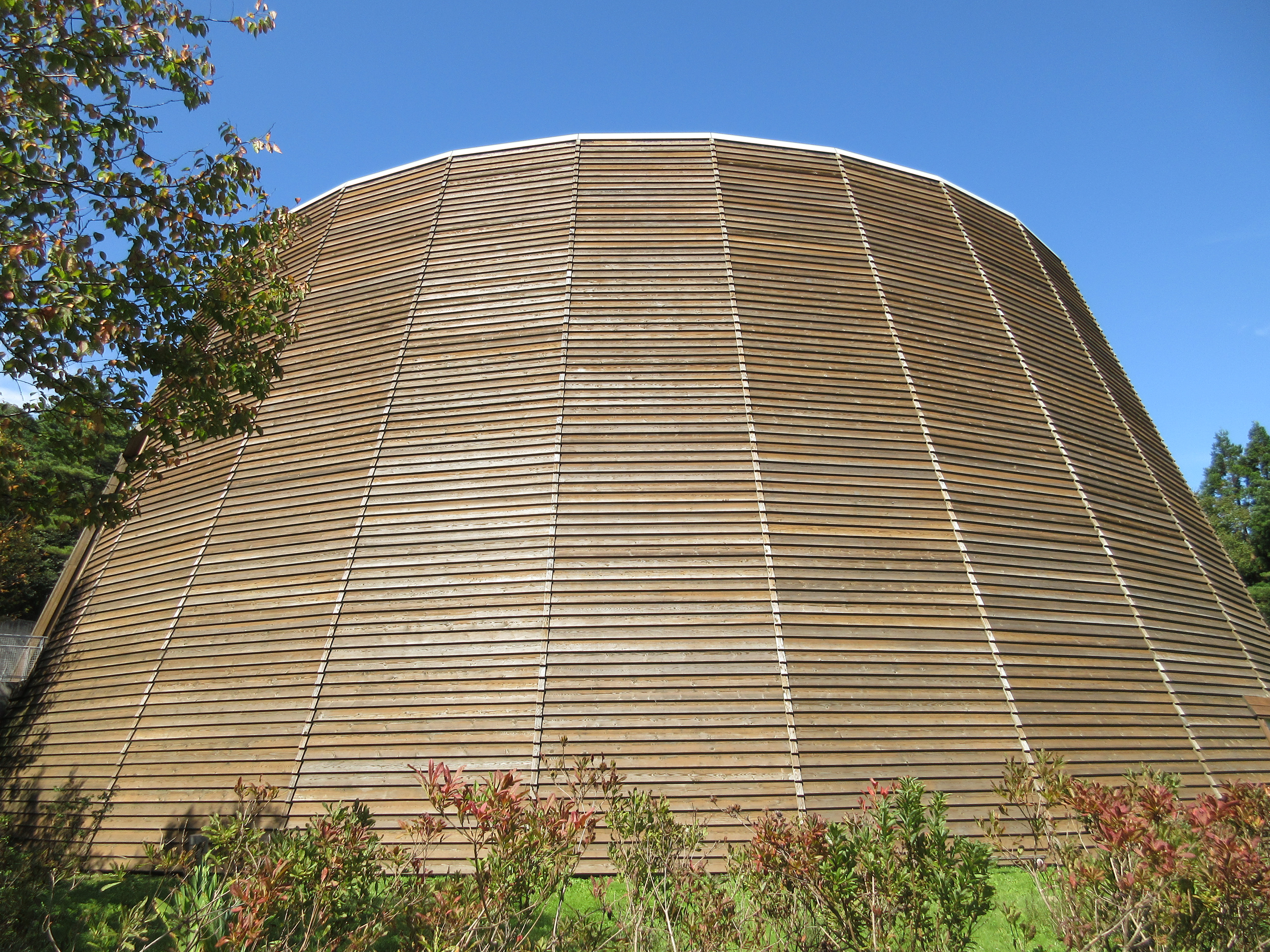 兵庫県立木の殿堂